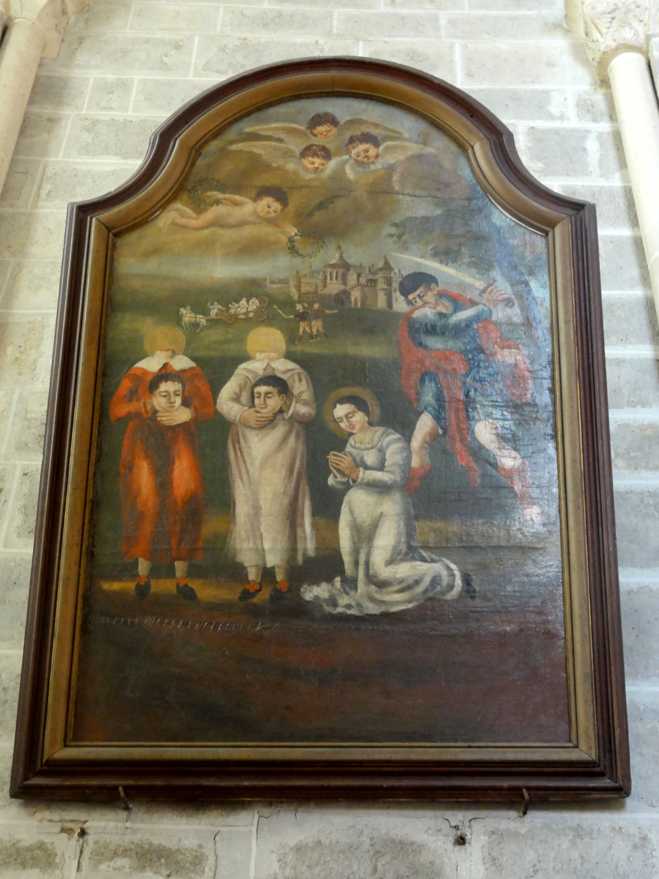 Chapelle des saints Martyrs, tableau.